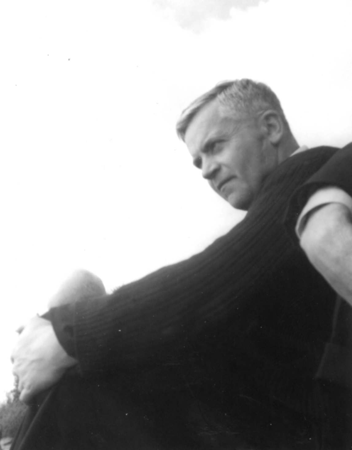 Luc'hskeudennet e-kerzh Kamp ar Vrezhonegerien e 1965.